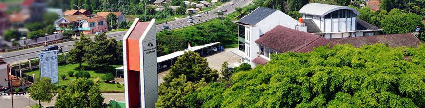 View Politeknik Negeri Lampung